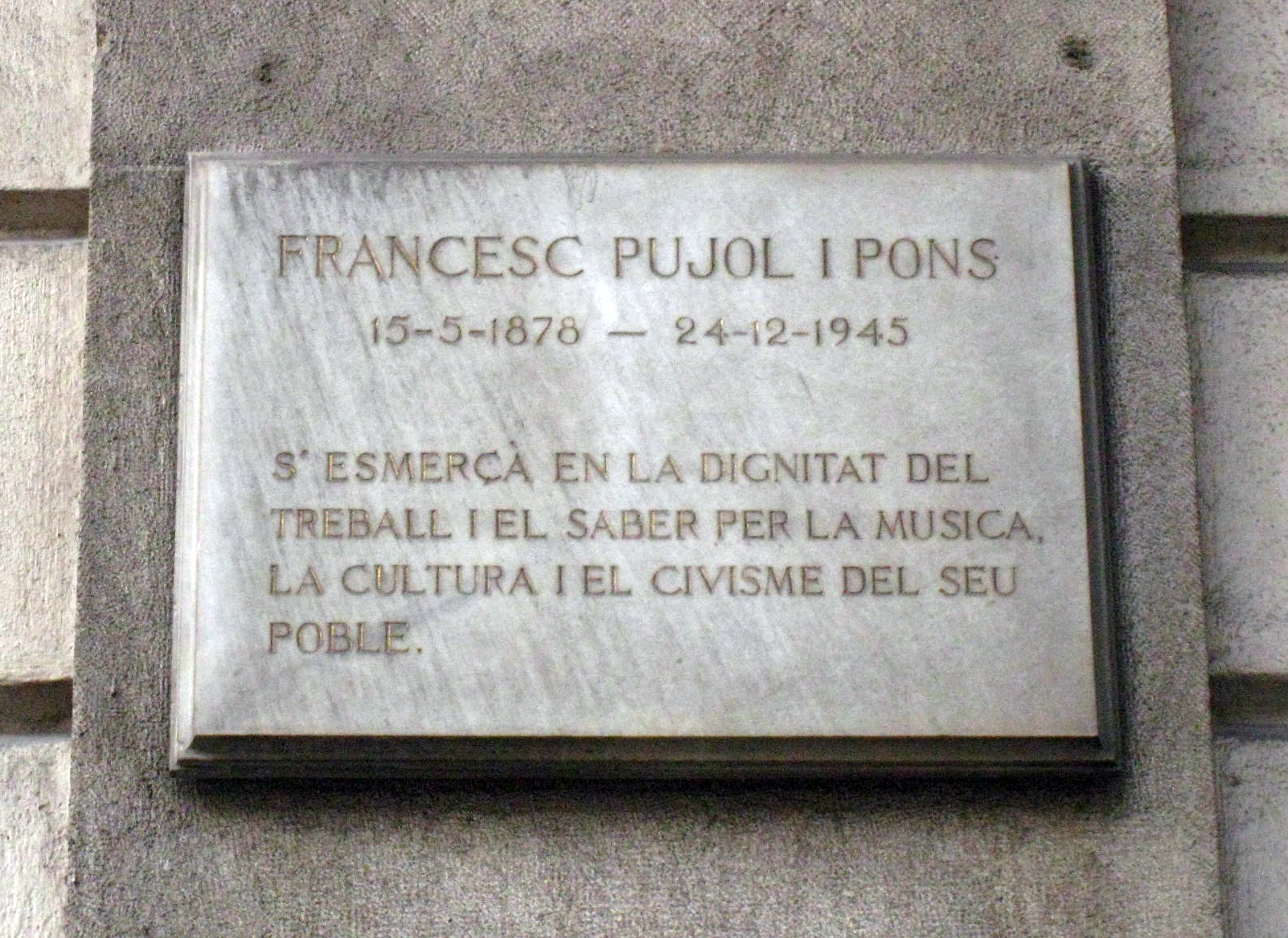 Francesc Pujol. C. Pau Claris, 104 (Barcelona)